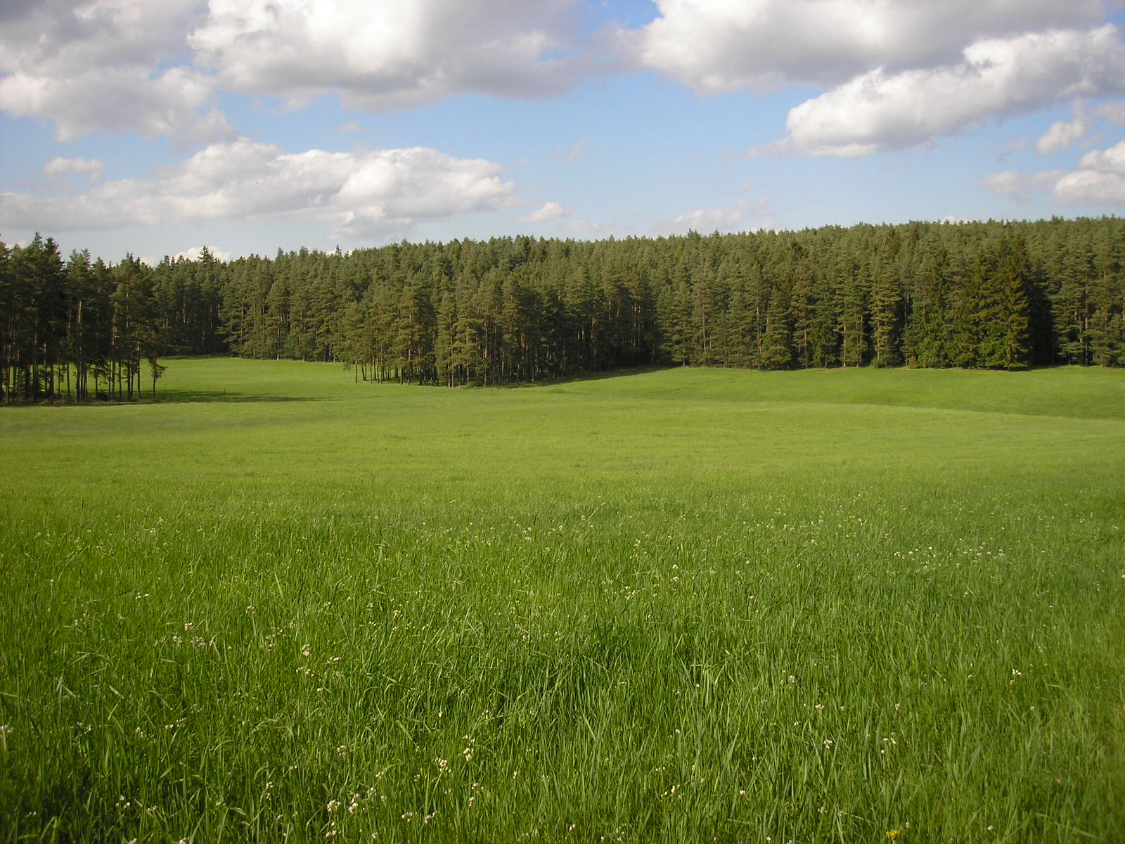 Paulinzellaer Vorland (Buntsandsteinformation) zwischen Gräfinau-Angstedt und Paulinzella (Thüringen).